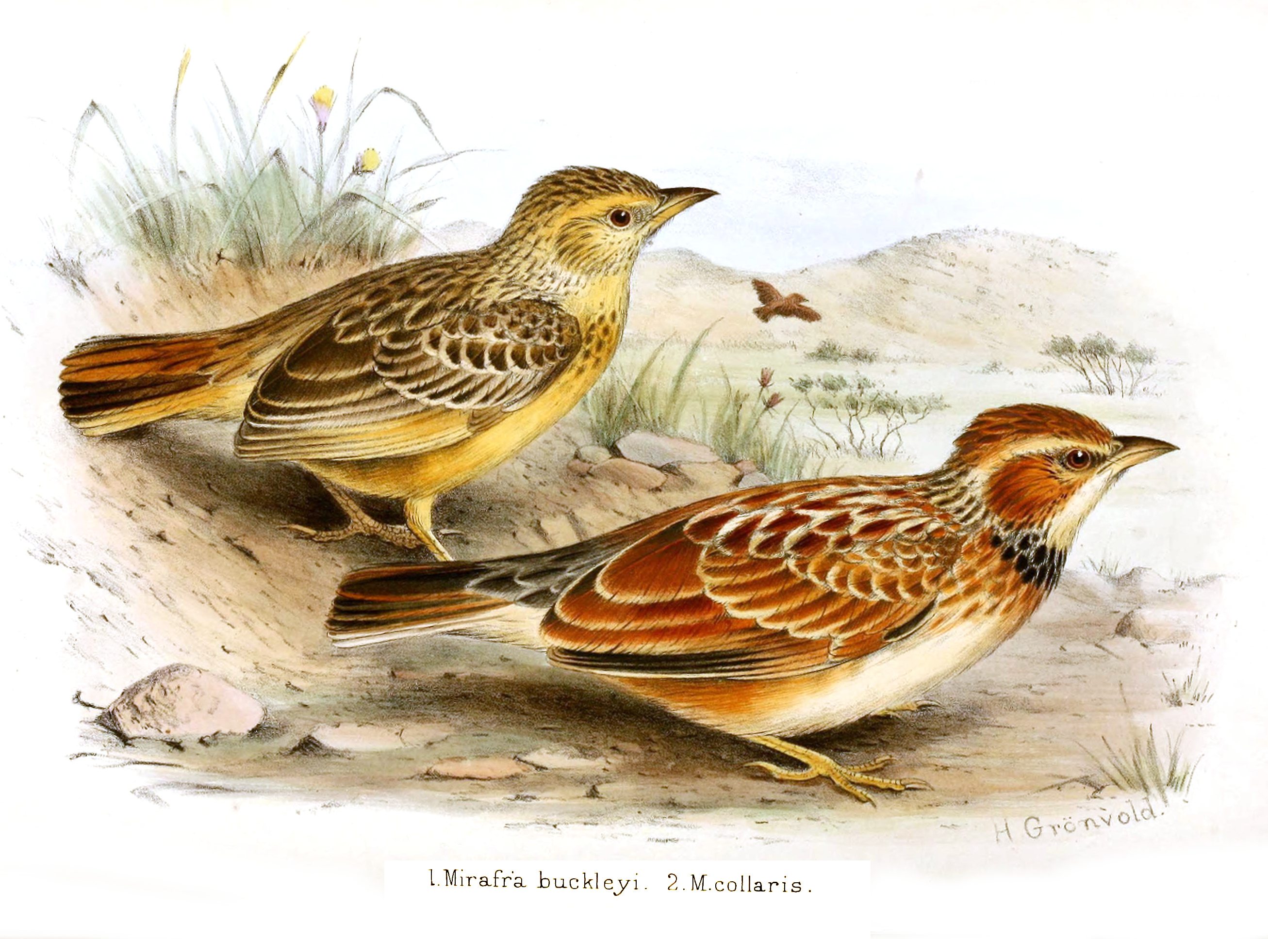 Mirafra buckleyi, Mirafra collaris